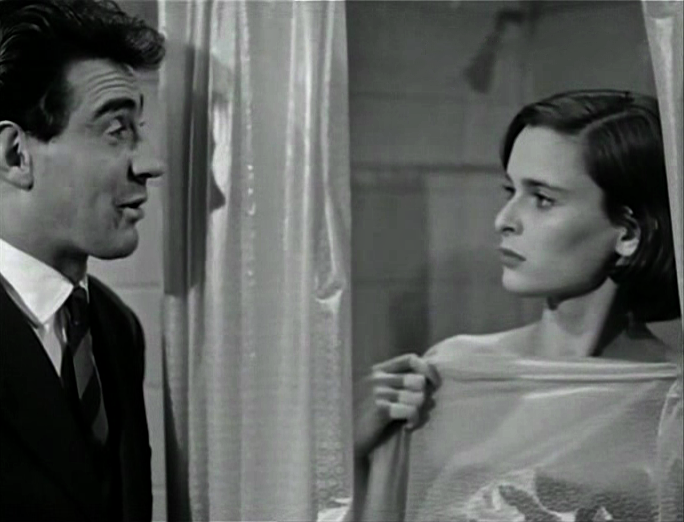 fotogramma del film Era lei che lo voleva!